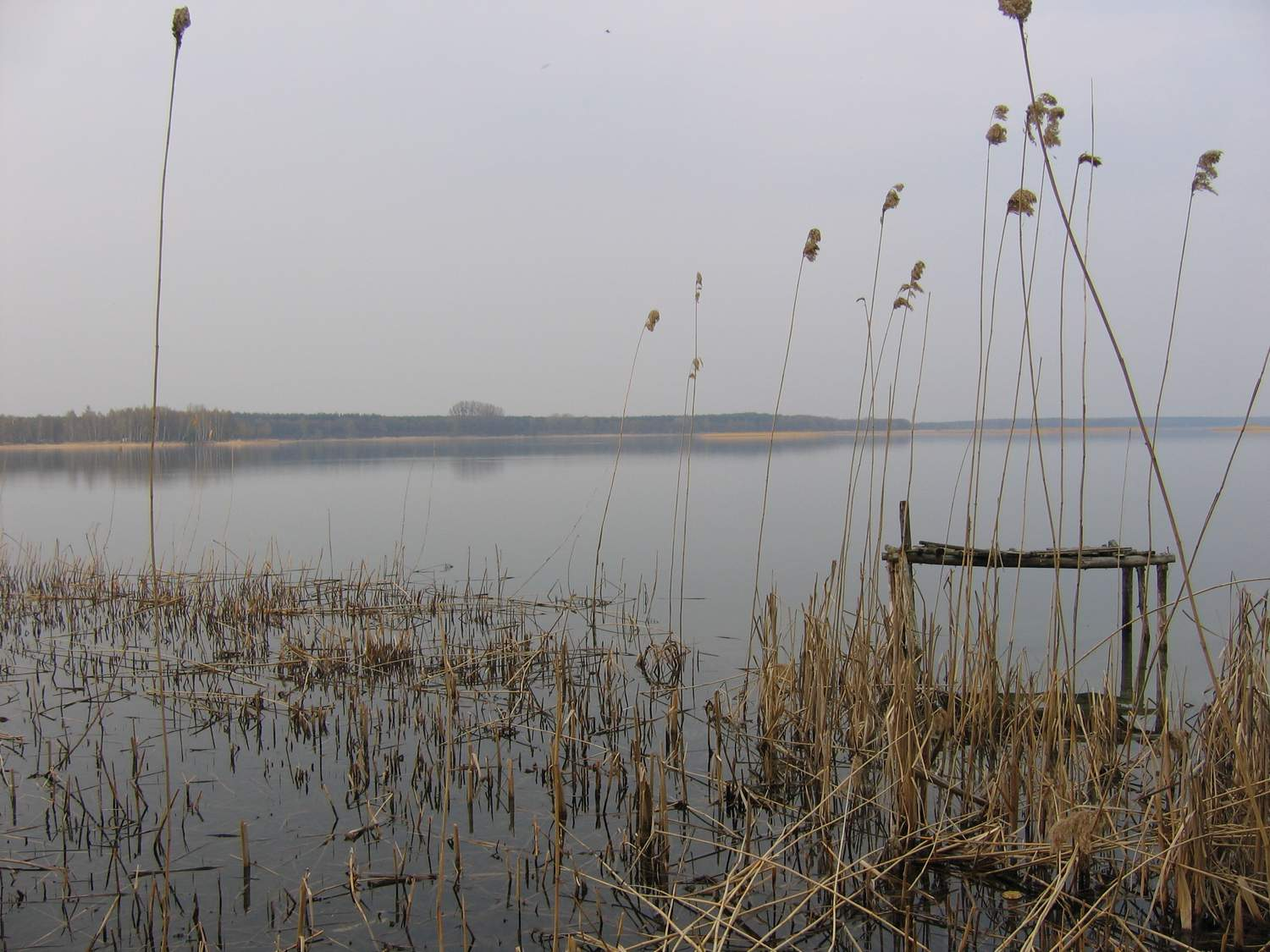 Jezioro Powidzkie, widok od strony północno-wschodniej